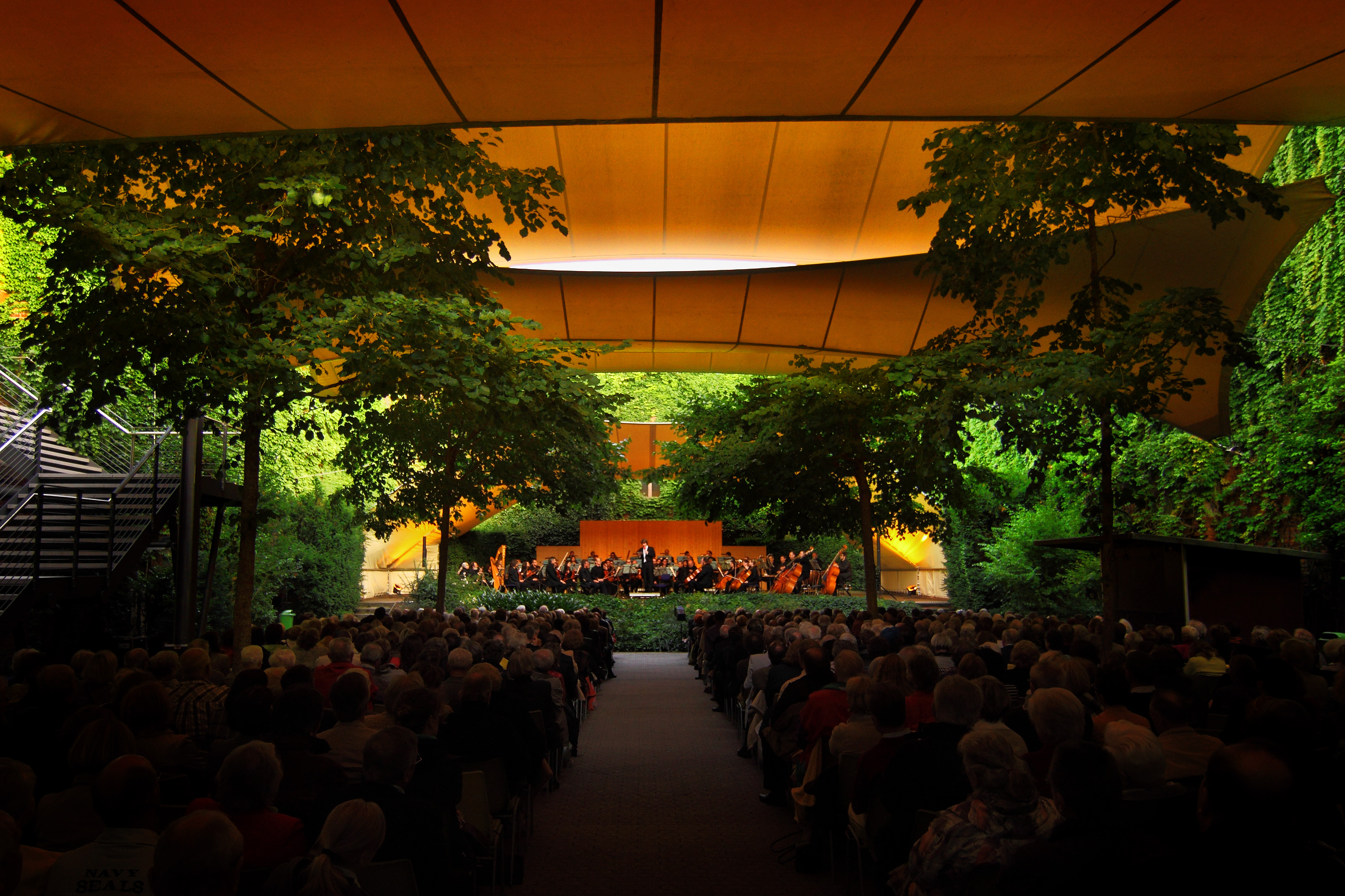 der Serenadenhof mit seinem einzigartigen Ambiente - für viele Nürnbergs schönster Open-Air-Spielort